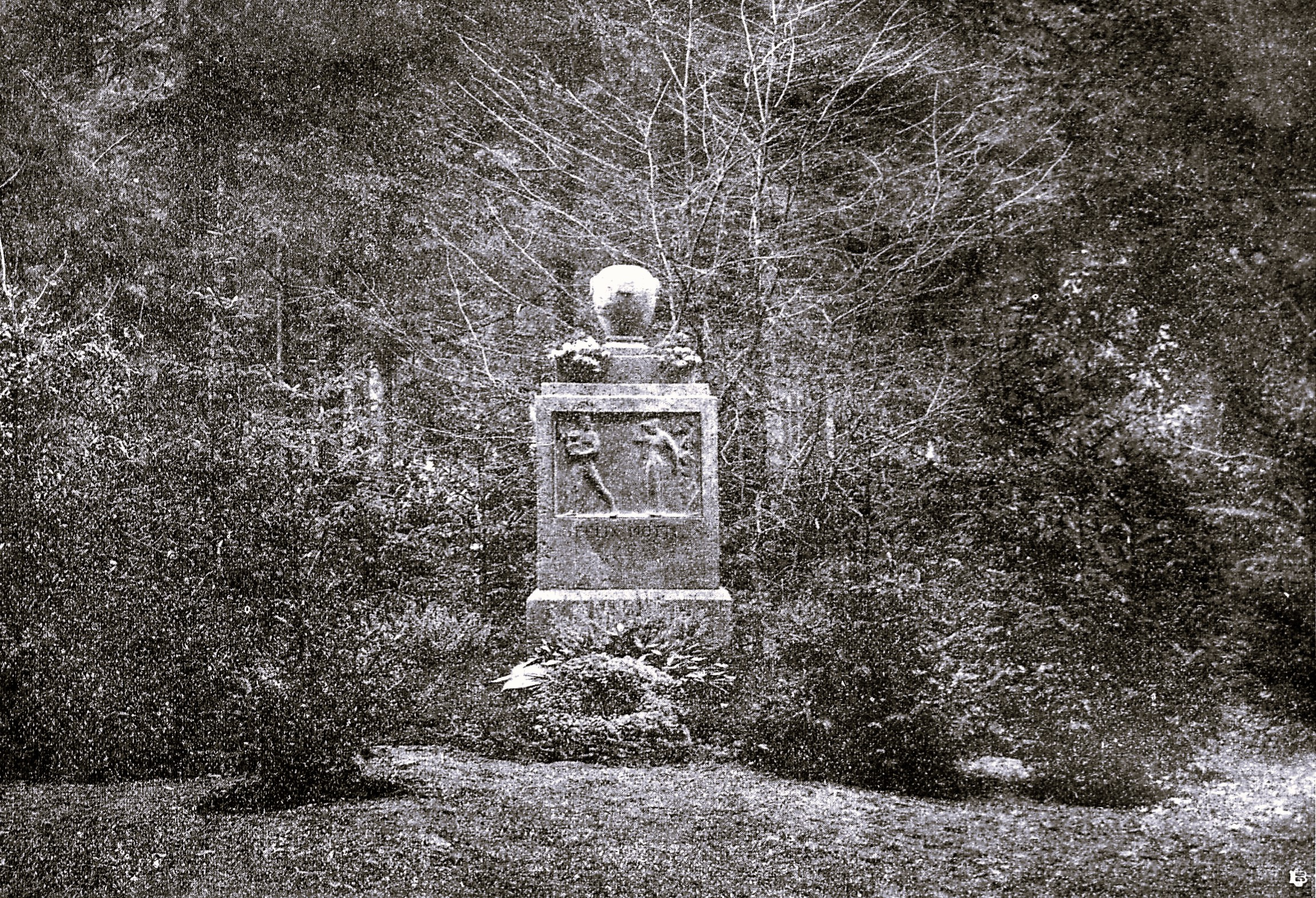 Grabdenkmal für Felix Mottl von Prof. Fritz Behn auf dem Waldfriedhof zu München.